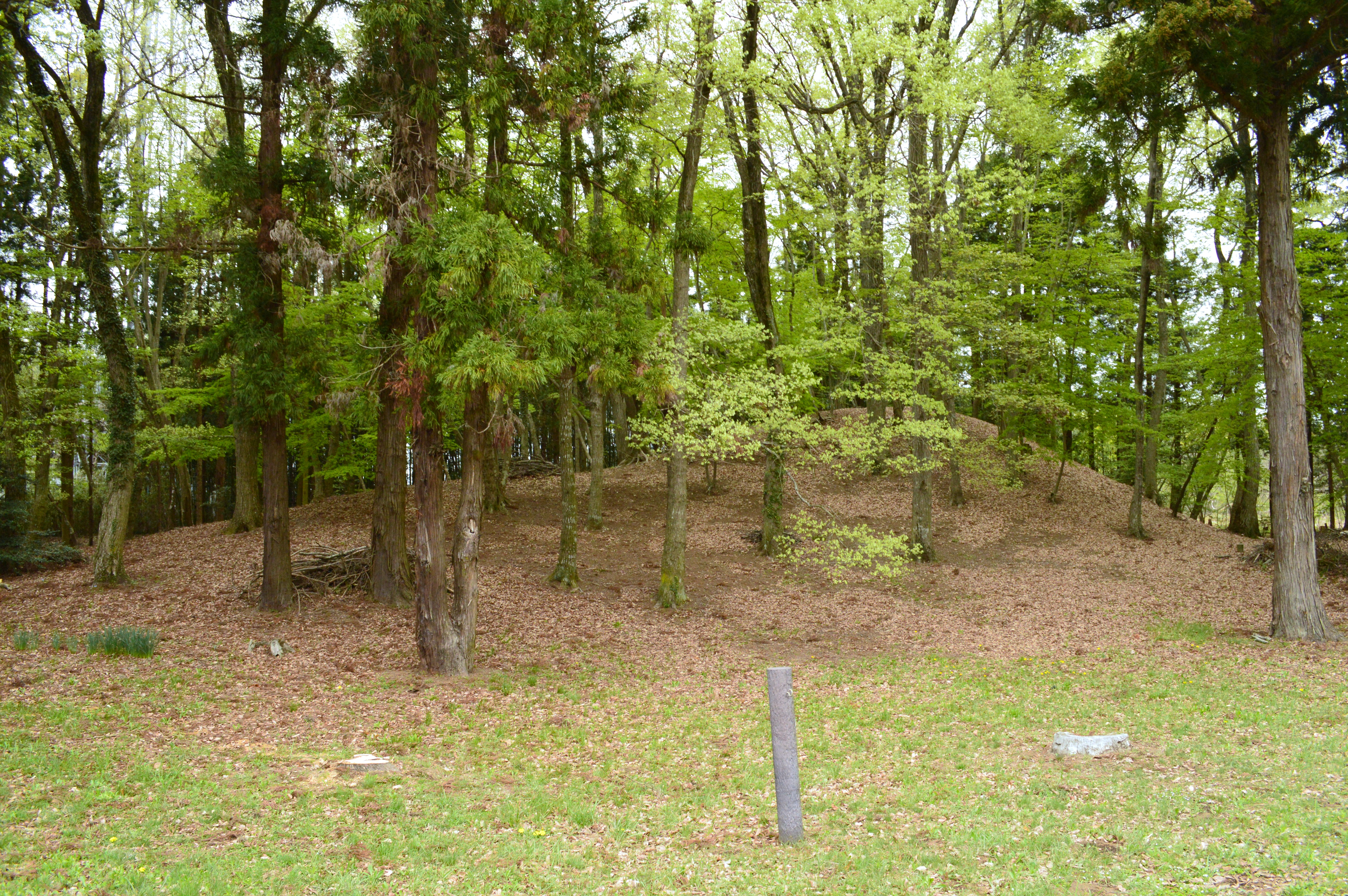 牛塚古墳 (壬生町) 全景